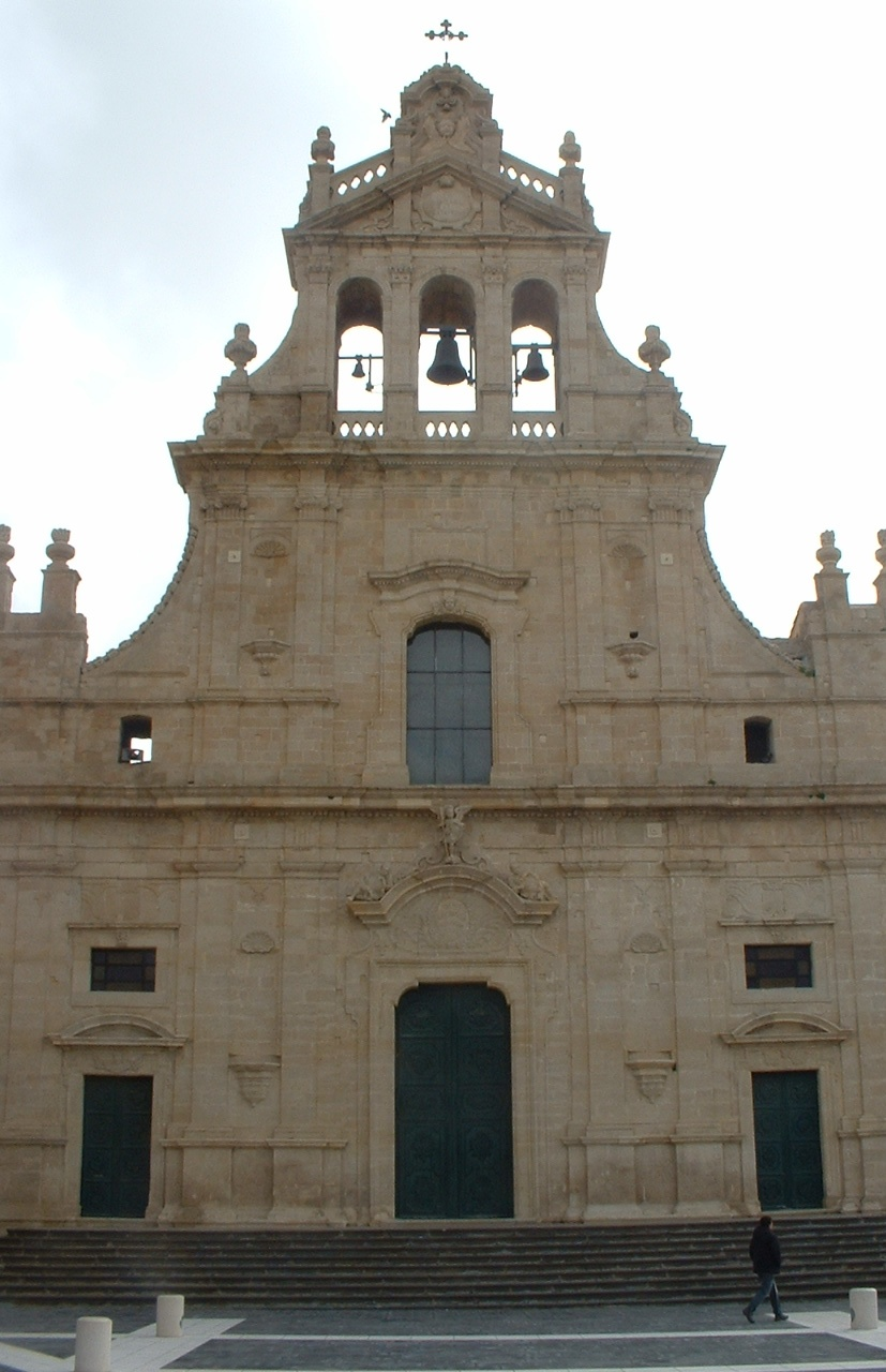 Grammichele, Fassade der Pfarrkirche San Michele (18. Jahrhundert, Obergeschoss 19. Jahrhundert von Carlo Sada).